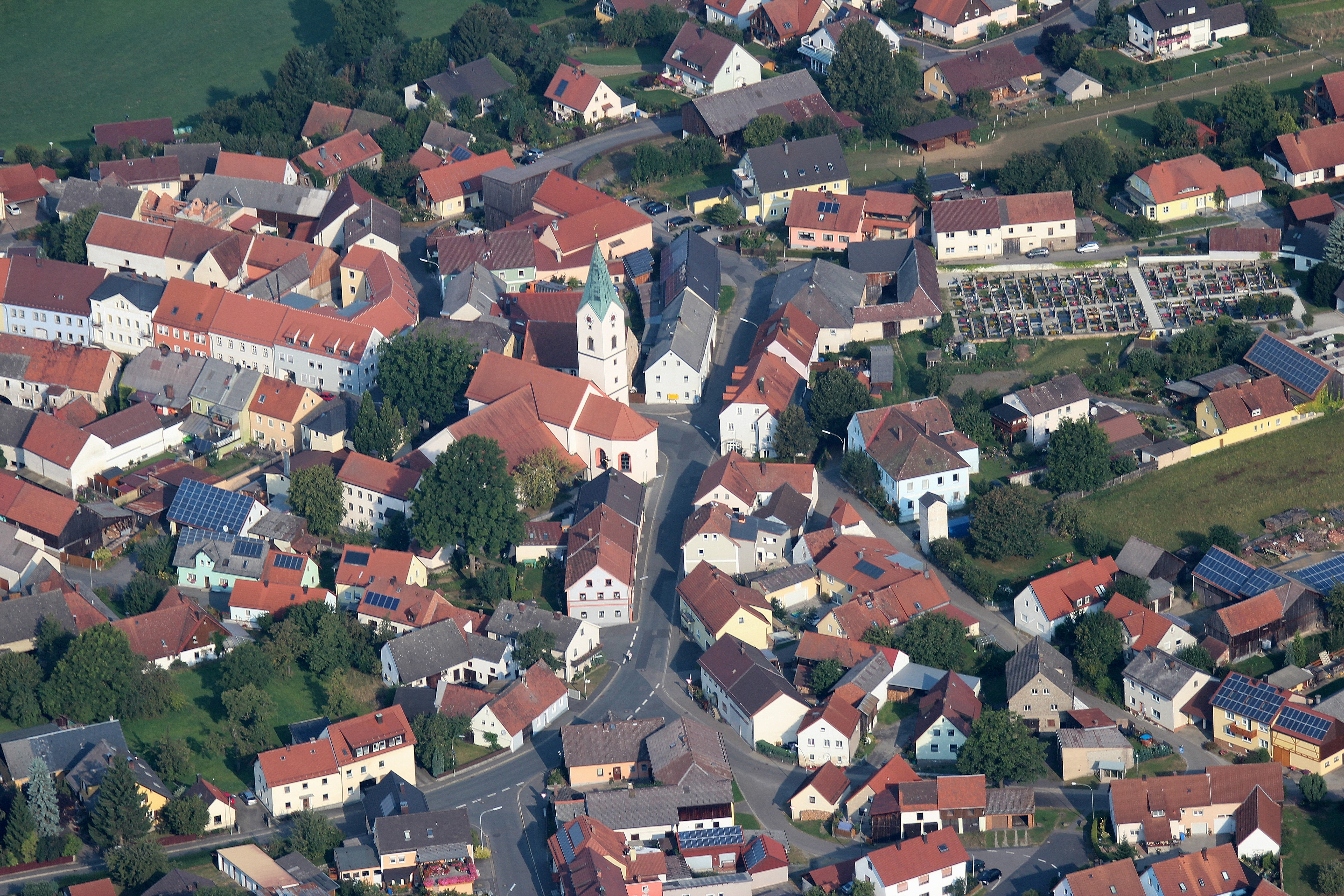 Waldthurn mit Pfarrkirche St. Sebastian, Landkreis Neustadt an der Waldnaab, Oberpfalz, Bayern